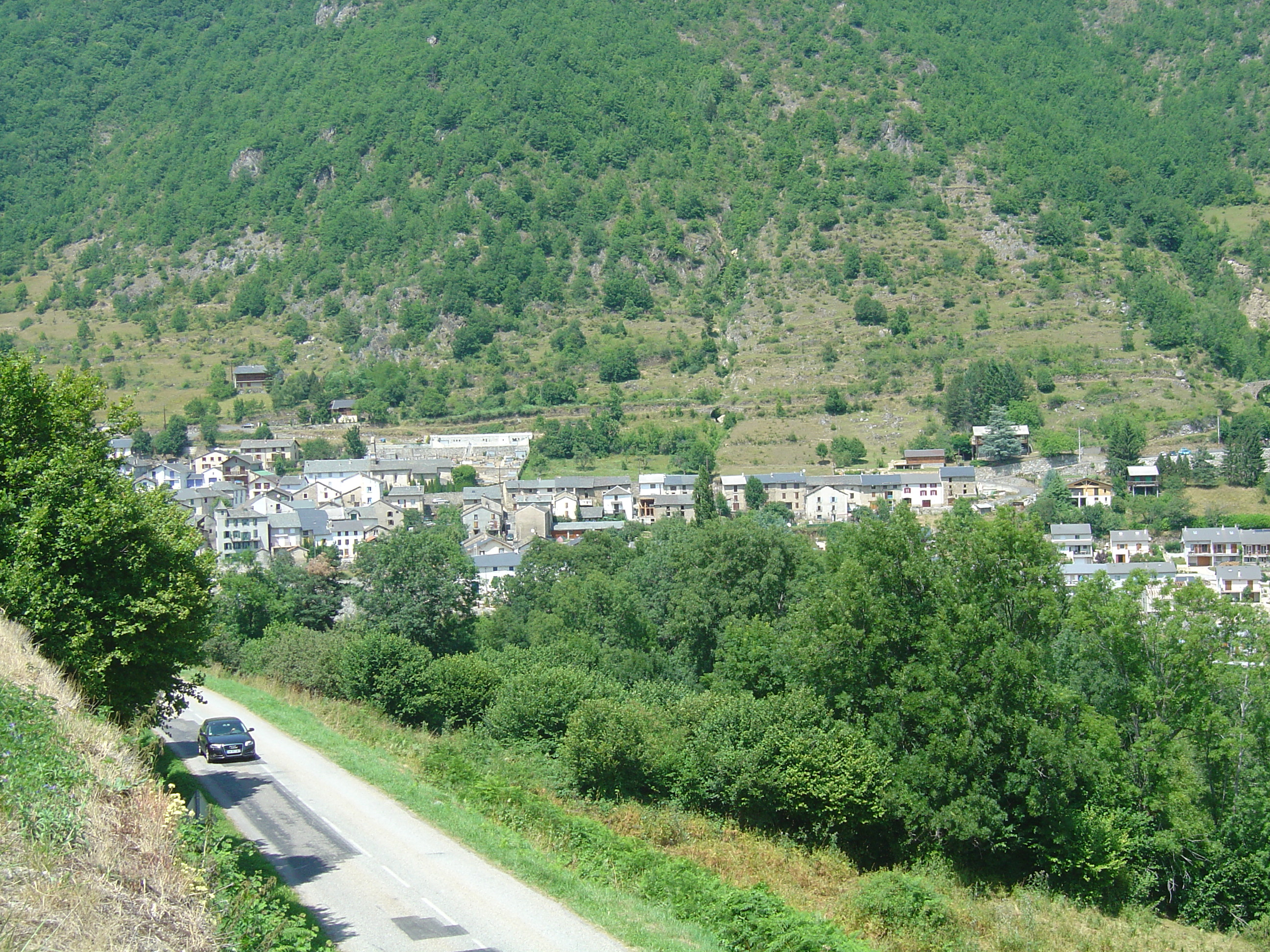 Vue générale de Rouze